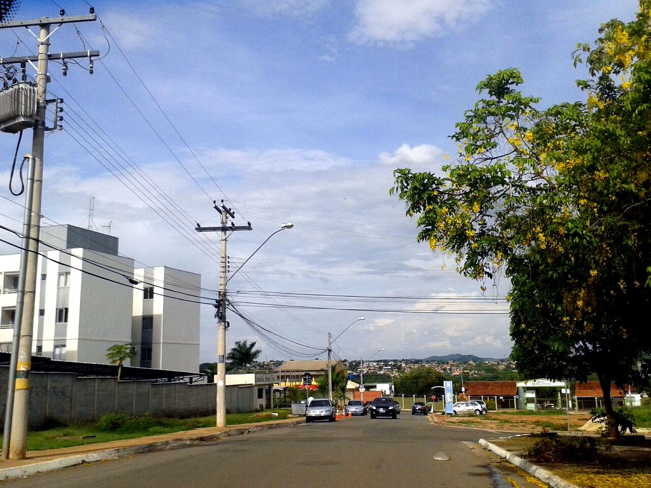 Rua no Jardim Novo Mundo, Goiânia. Novembro de 2016.